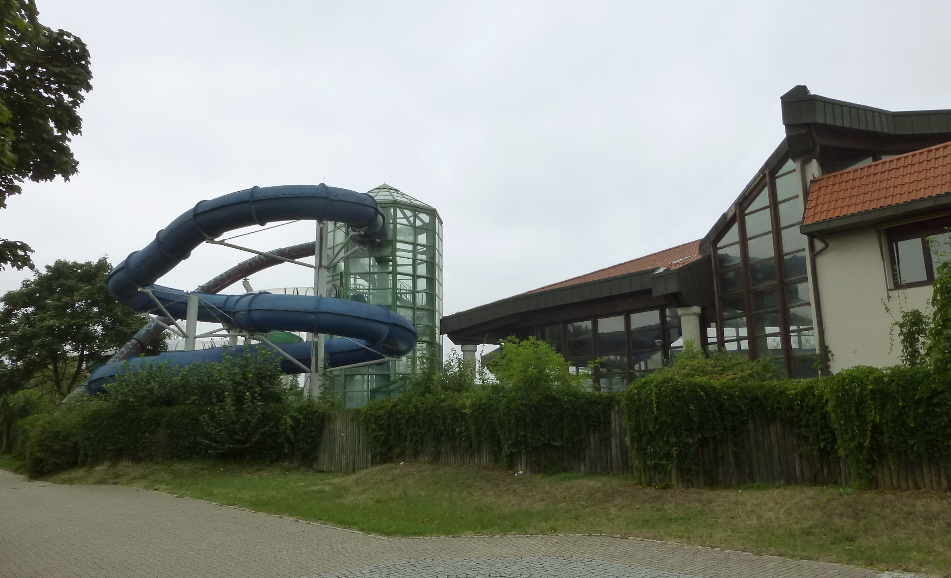 Centre de loisirs Königstherme à Königsbrunn, Souabe, Bavière. Déclaré en faillite le 30 juillet 2015.